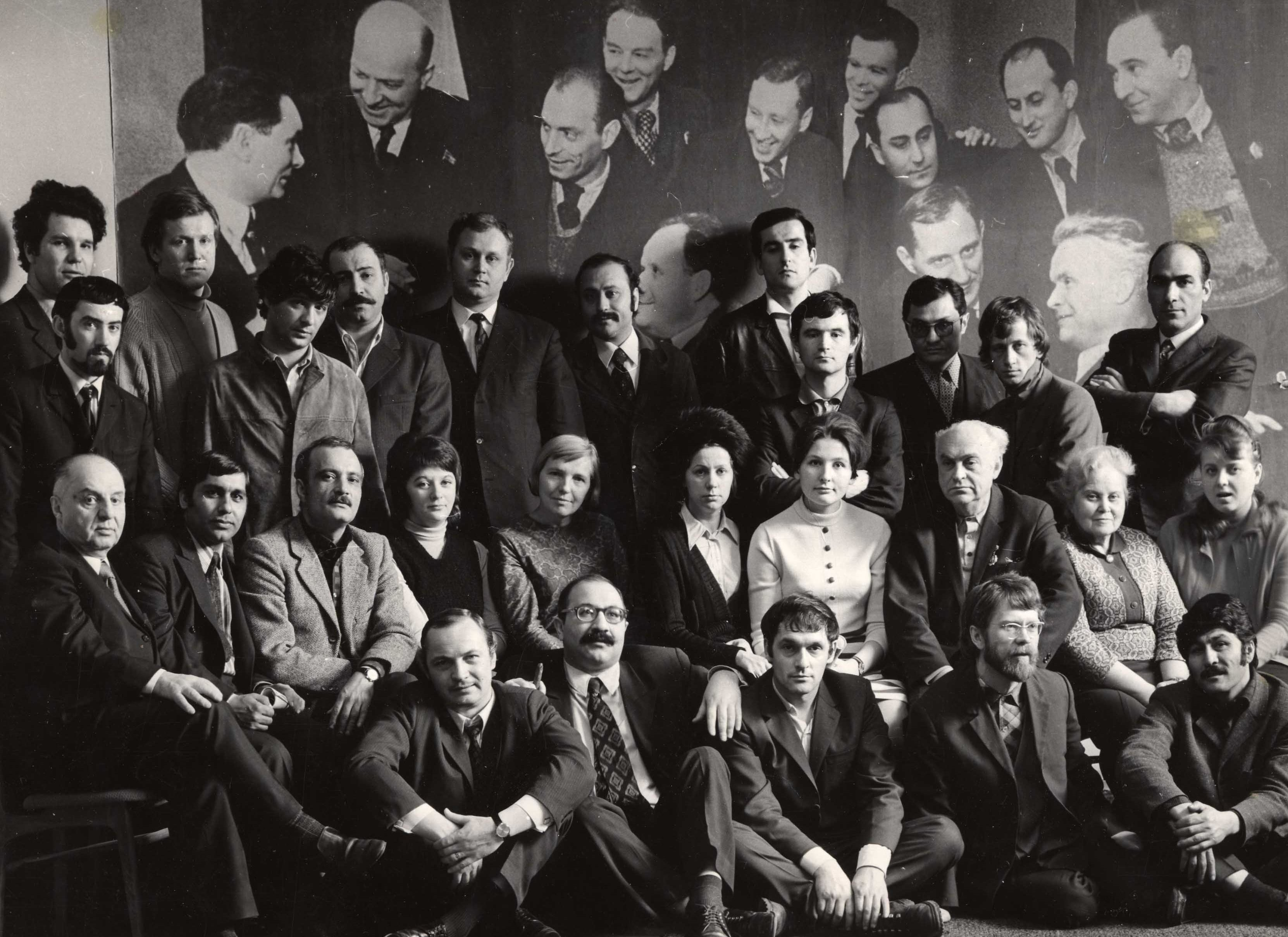 Выпускники Высших курсов сценаристов и режиссеров при Госкино СССР 1972 год